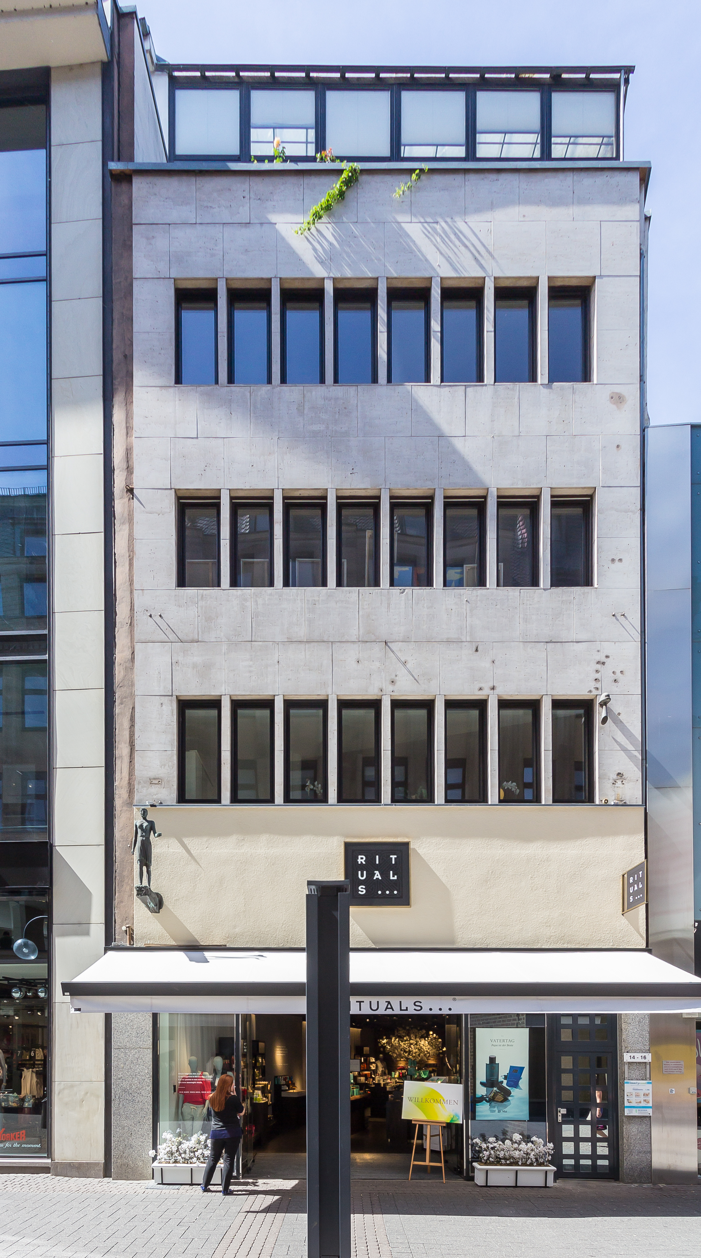 Geschäftshaus Schildergasse 14-16, Köln